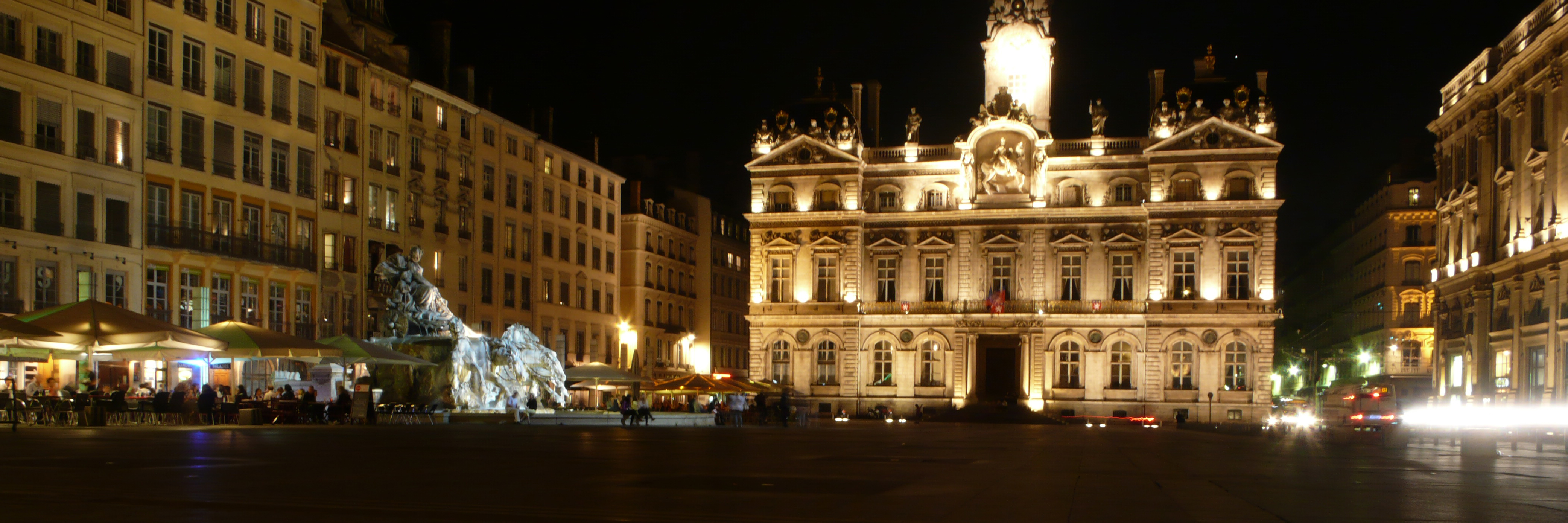 Place des Terreaux: Hôtel de ville (PA00117820) et Fontaine Bartholdi (PA00118120) .